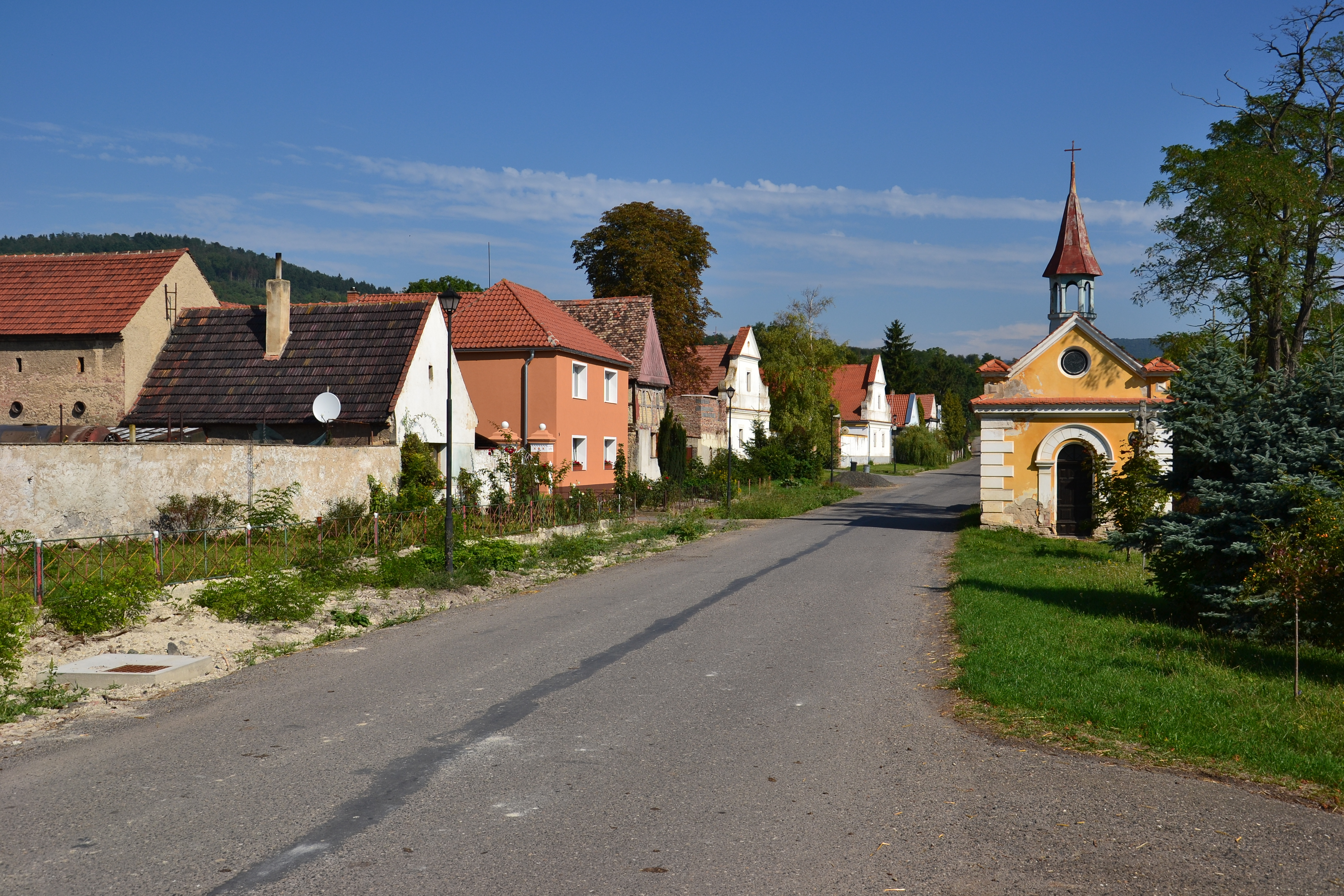 Hlavní ulice